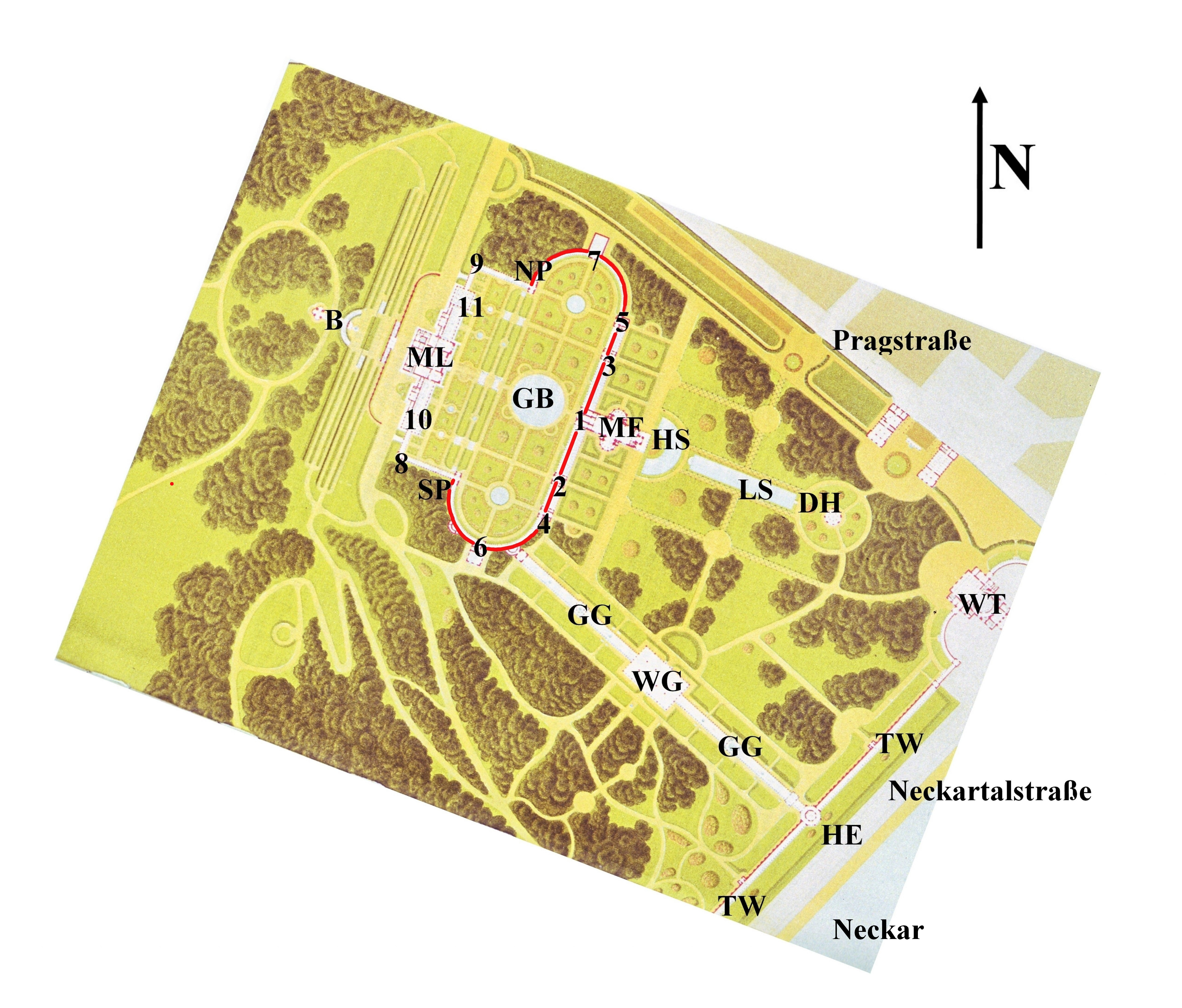 Ludwig von Zanth: Plan der Wilhelma von 1855 (Die Buchstabenkürzel und die Zahlen zur Bezeichnung von Gebäuden und Geländeteilen wurden nachträglich eingefügt). Rote Linie = innerer Wandelgang, B = Belvedere, DH = Damaszenerhalle, GB = Großes Bassin, GG = Gewächshausgang, HE = Haupteingang, HS = Halbmondsee, LS = Langer See, MF = Maurischer Festsaal (heute Aquarium-Terrarium), ML = Maurisches Landhaus, NP = Nördlicher Pavillon, SP = Südlicher Pavillon, TW = äußerer Wandelgang mit der Terrakottawand, WG = Wintergarten, WT = Wilhelma-Theater 1 = Hauptpavillon des inneren Wandelgangs, 2/3 = Nebenpavillons, axial zu den Eckpavillons der Gewächshausflügel, 4/5 = Nebenpavillons, axial zu den Pavillons SP bzw. NP, 6/7 = Bogenpavillons, 8/9 = Eckkioske der Laubengänge, 10/11 = Eckpavillons der Gewächshausflügel.